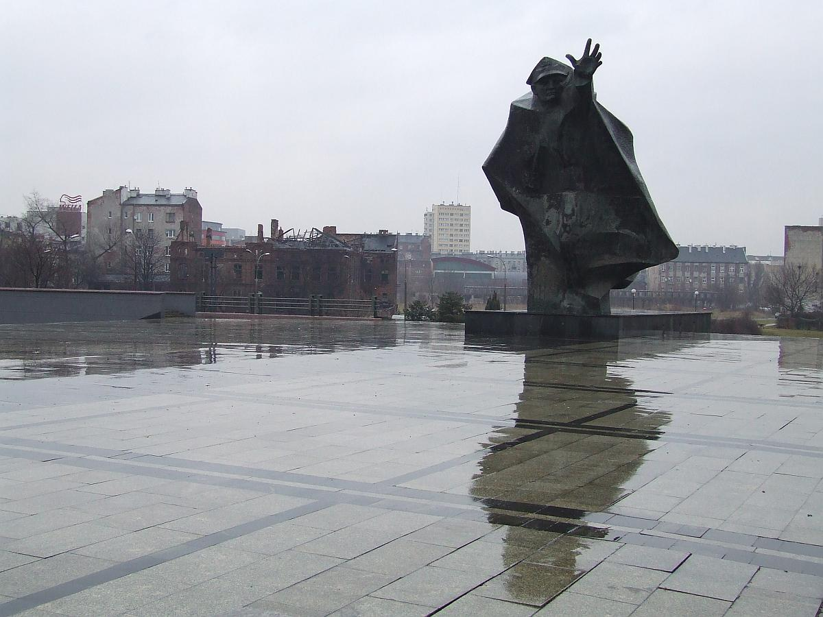 Pomnik Kościuszkowców, Warsaw